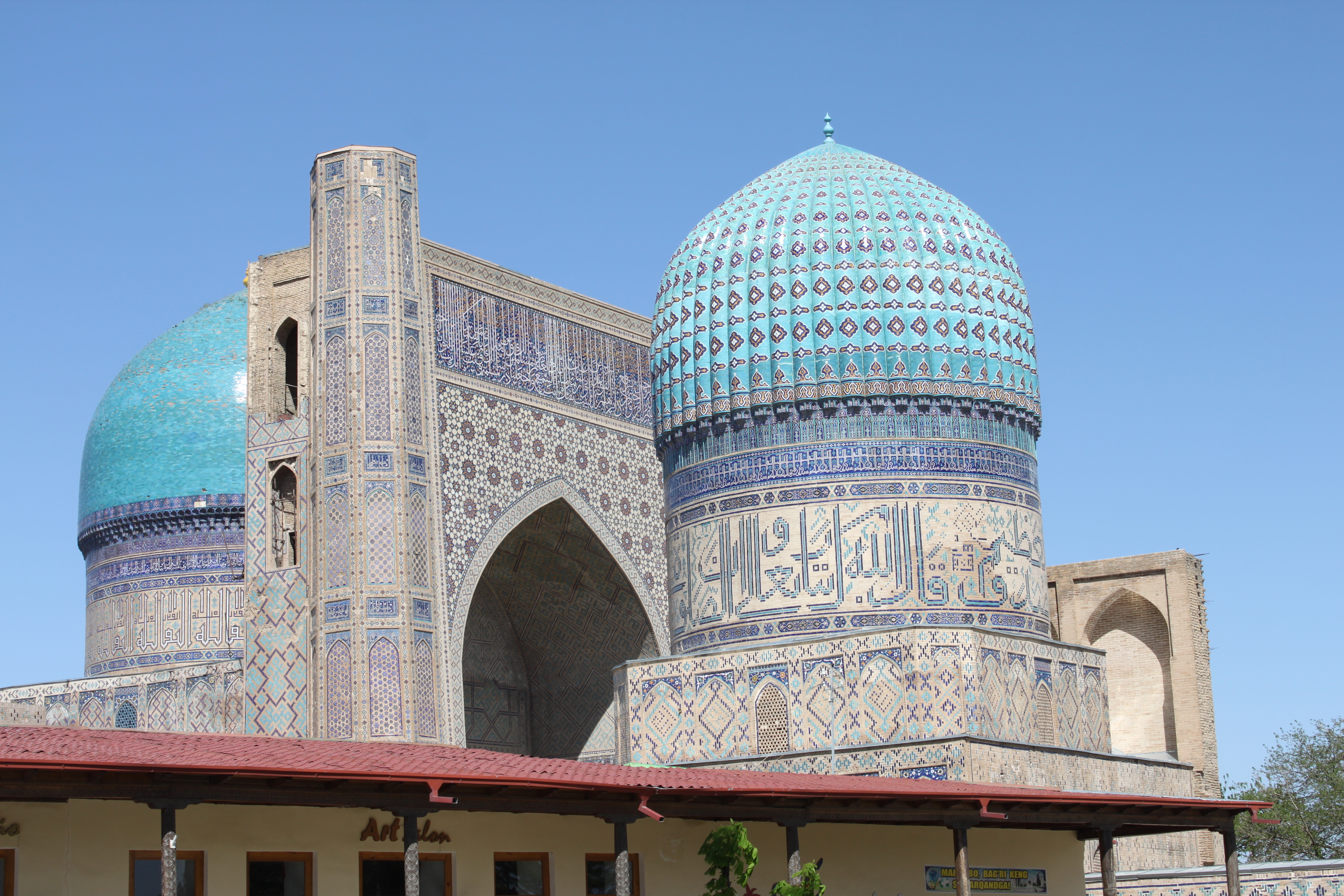 Vue générale de Bibi Khanoum: la petite mosquée côté Sud au premier plan ; derrière: la mosquée principale